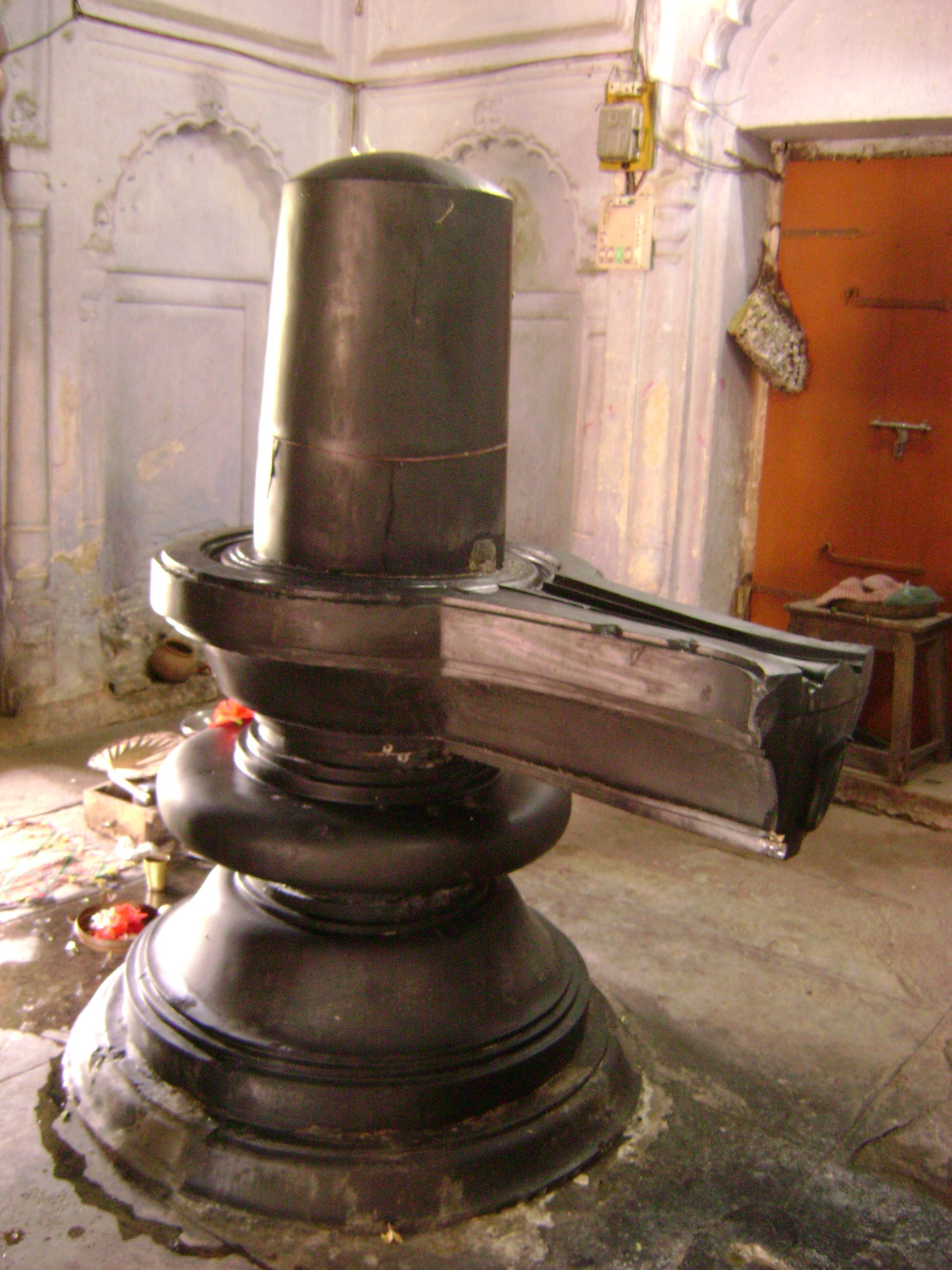 Puthia Mandirs, Chapai Nababgonj, Bangladesh